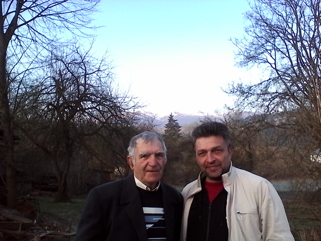 з другом